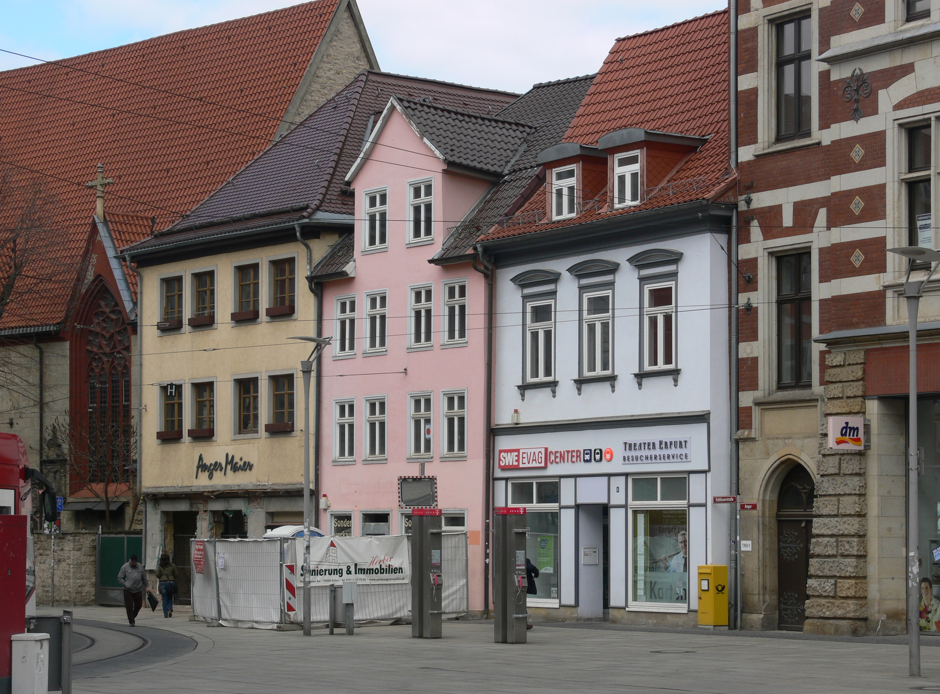 Häuserzeile am Anger, Übergang zur Schlösserstraße. Von rechts nach links Hauptpostamt Erfurt (Teil), Haus Schlösserstraße 4 (EVAG), Haus Schlösserstraße 6, Haus Schlösserstraße 8 (Café Anger-Maier im Umbau), Lorenzkirche